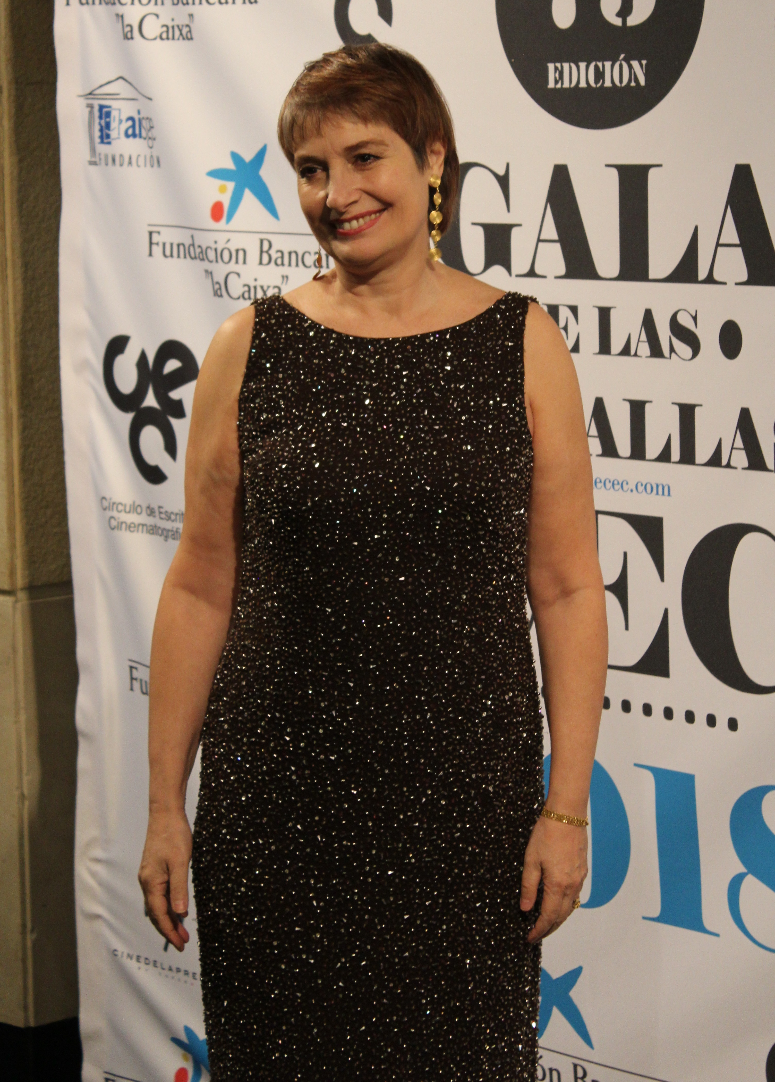 La actriz española Assumpta Serna en la 73 edición de las Medallas del Círculo de Escritores Cinematográficos, donde recibió la Medalla de honor.